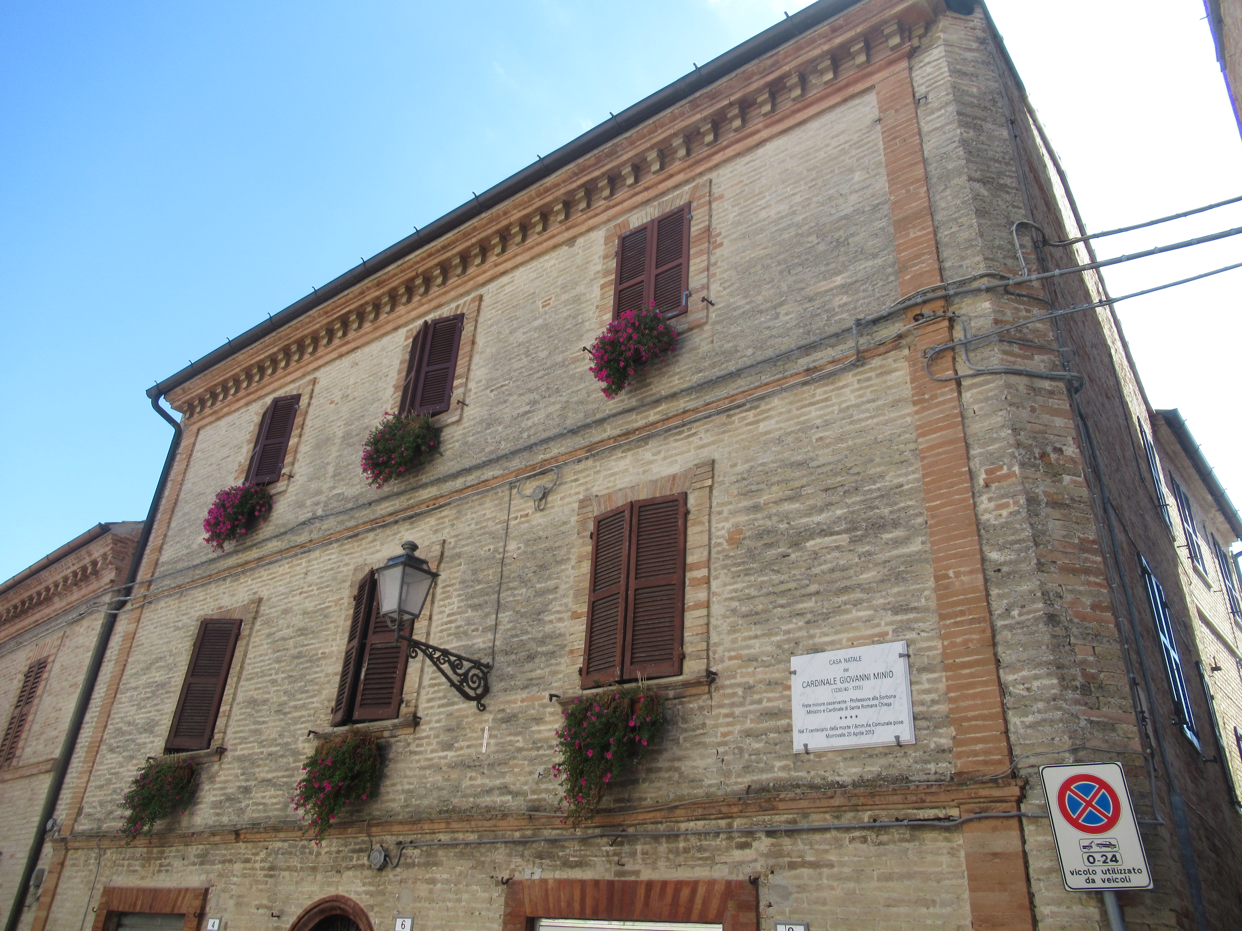 Morrovalle-Casa natale del cardinale Giovanni Minio